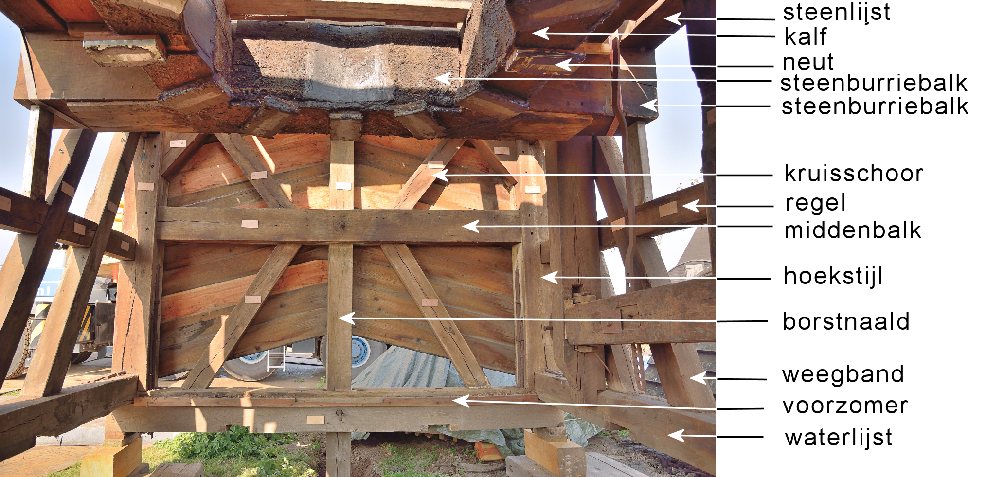 Laaglandse Molen, bovenhuis met tekst